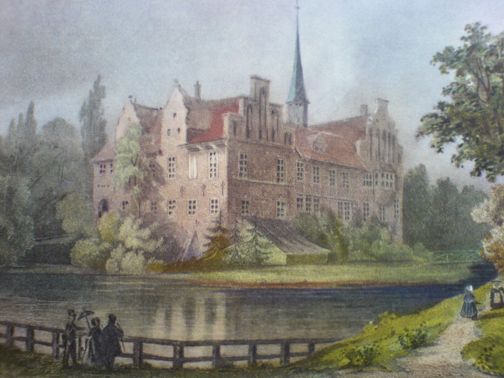 Bildbeschreibung: Bergedorfer Schloss ca. 1850 Quelle: Lithographie. ca. 1850 Fotograf/Zeichner: Besitz podracerHH Datum: 04.2006